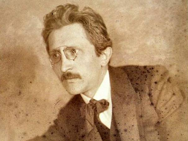 Josef Váchal (1884 - 1969), Český malíř a grafik.